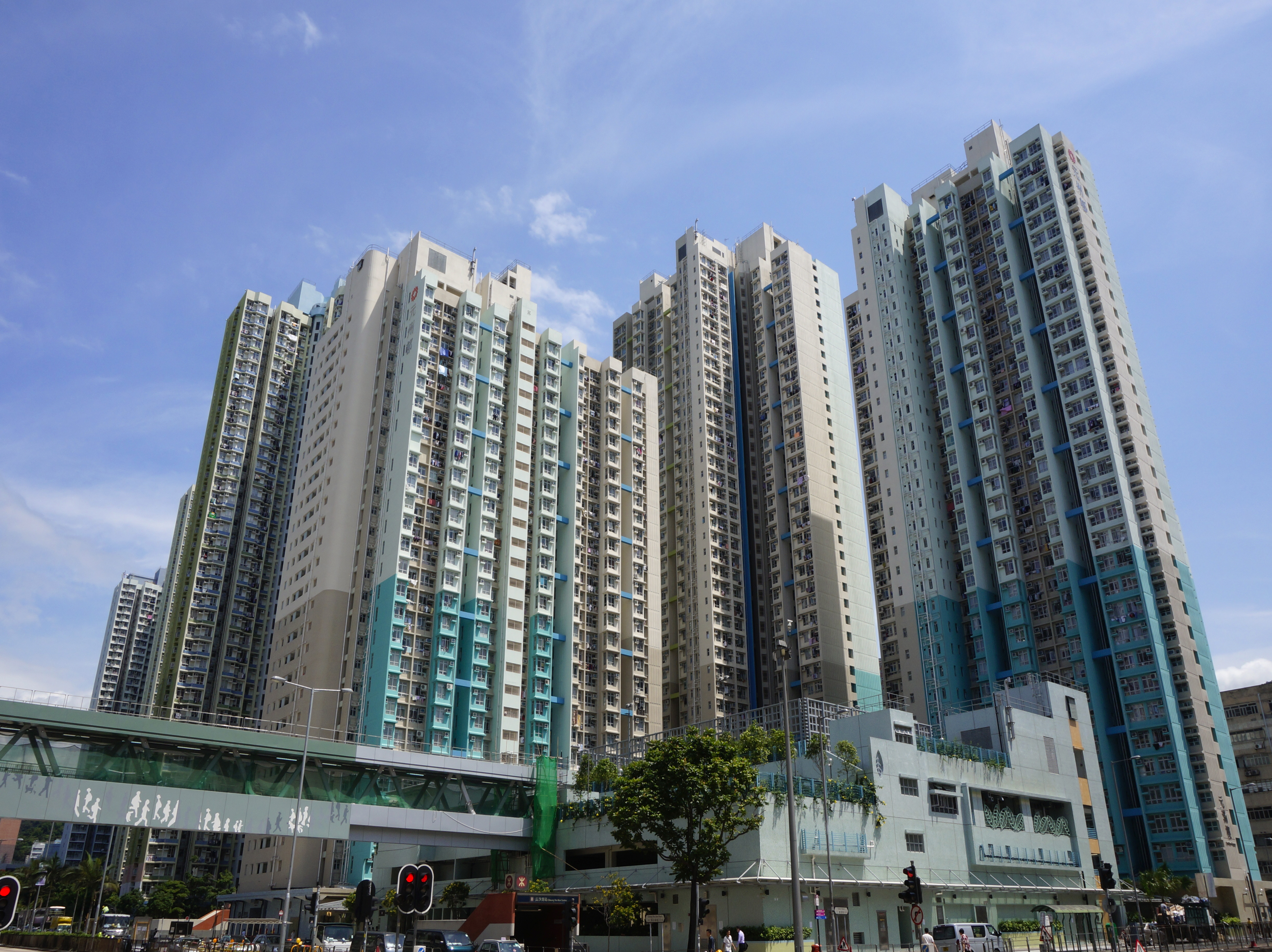 元州邨第五期樓宇元逸樓、元滿樓、元慧樓、元謙樓 Un Chau Estate Phase 5, built on the site of Cheung Sha Wan Factory Estate